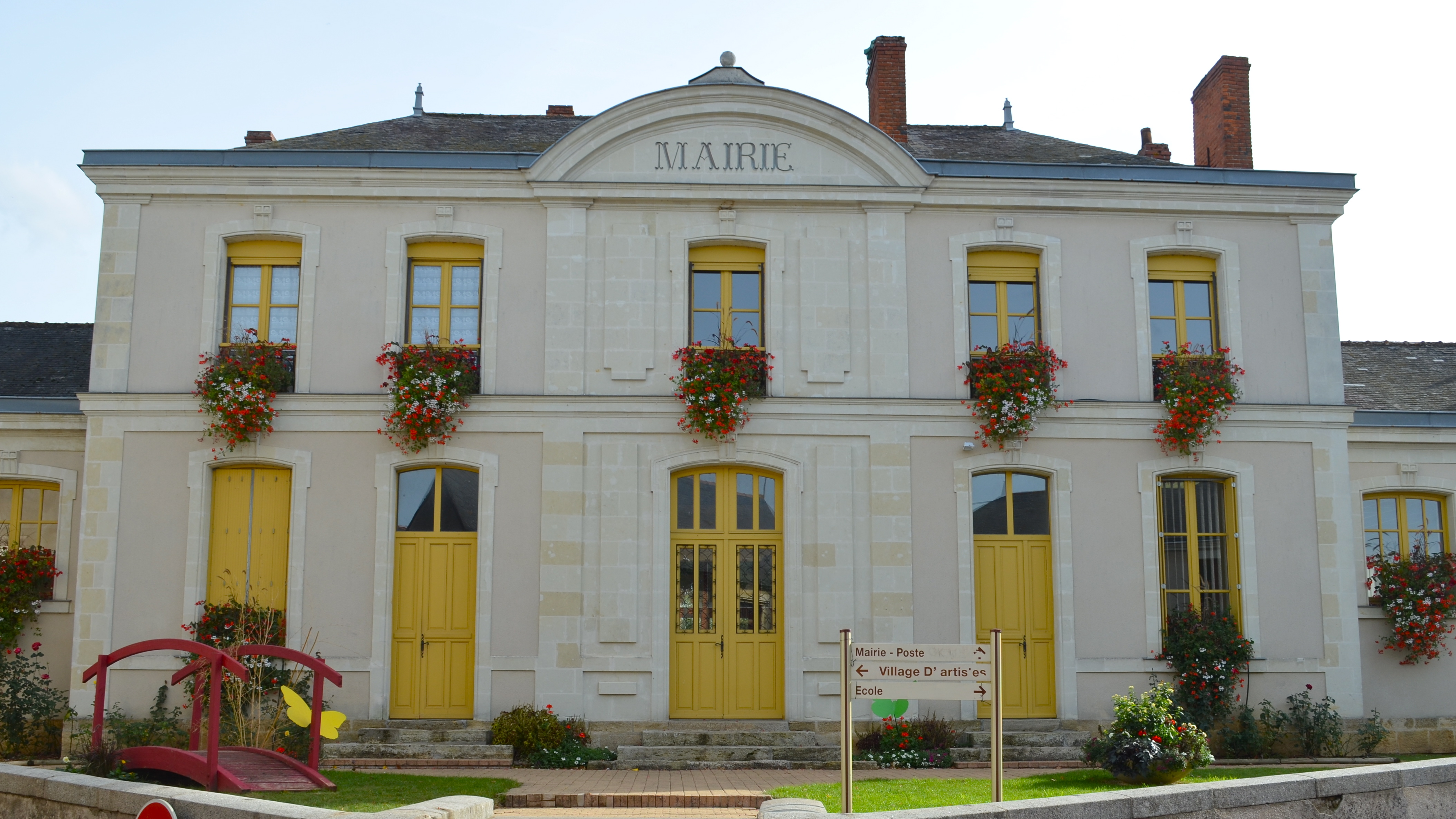 Mairie de Rablay-sur-Layon - (Maine-et-Loire)